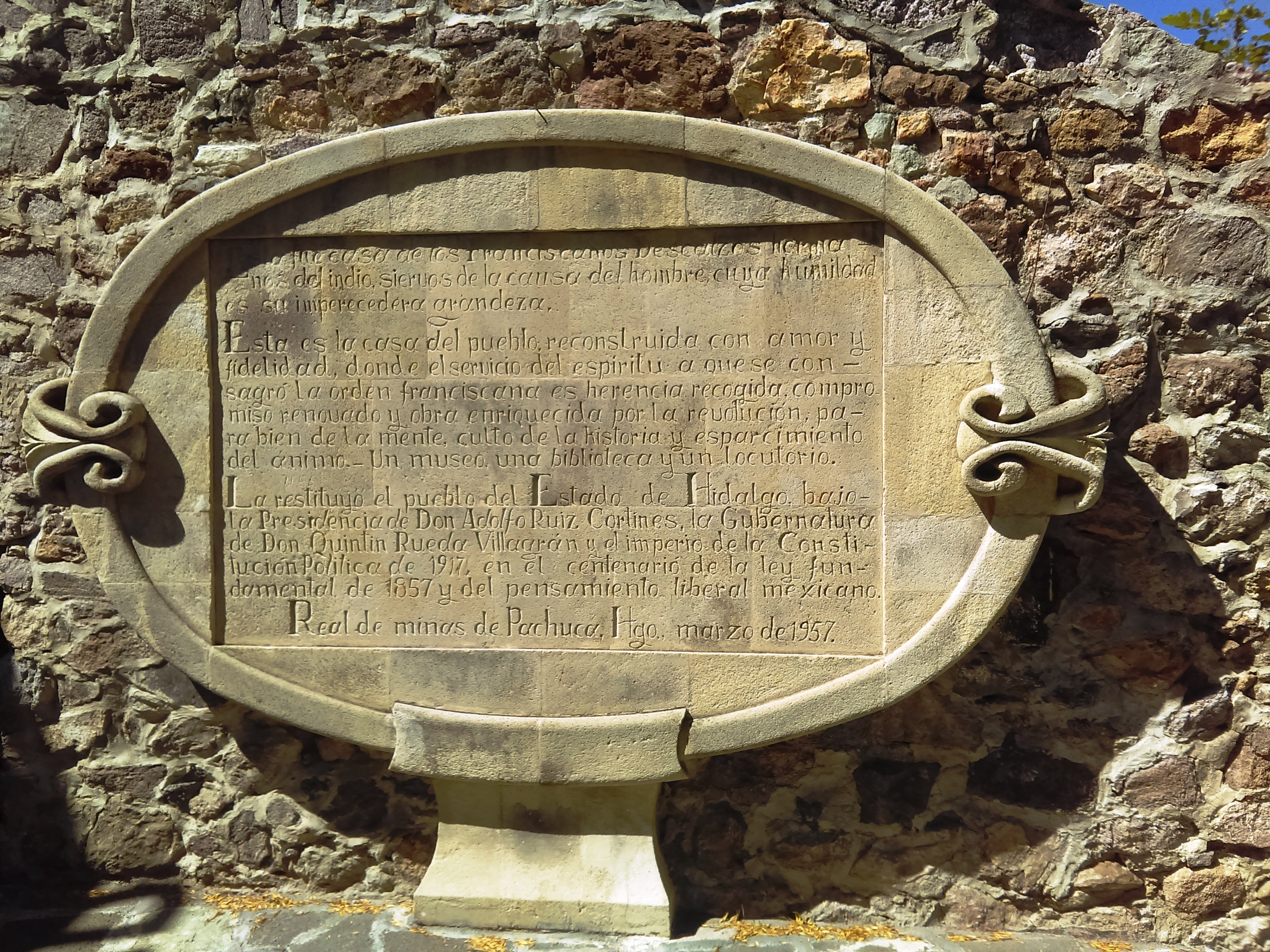 Exconvento de San Francisco en Pachuca, México.